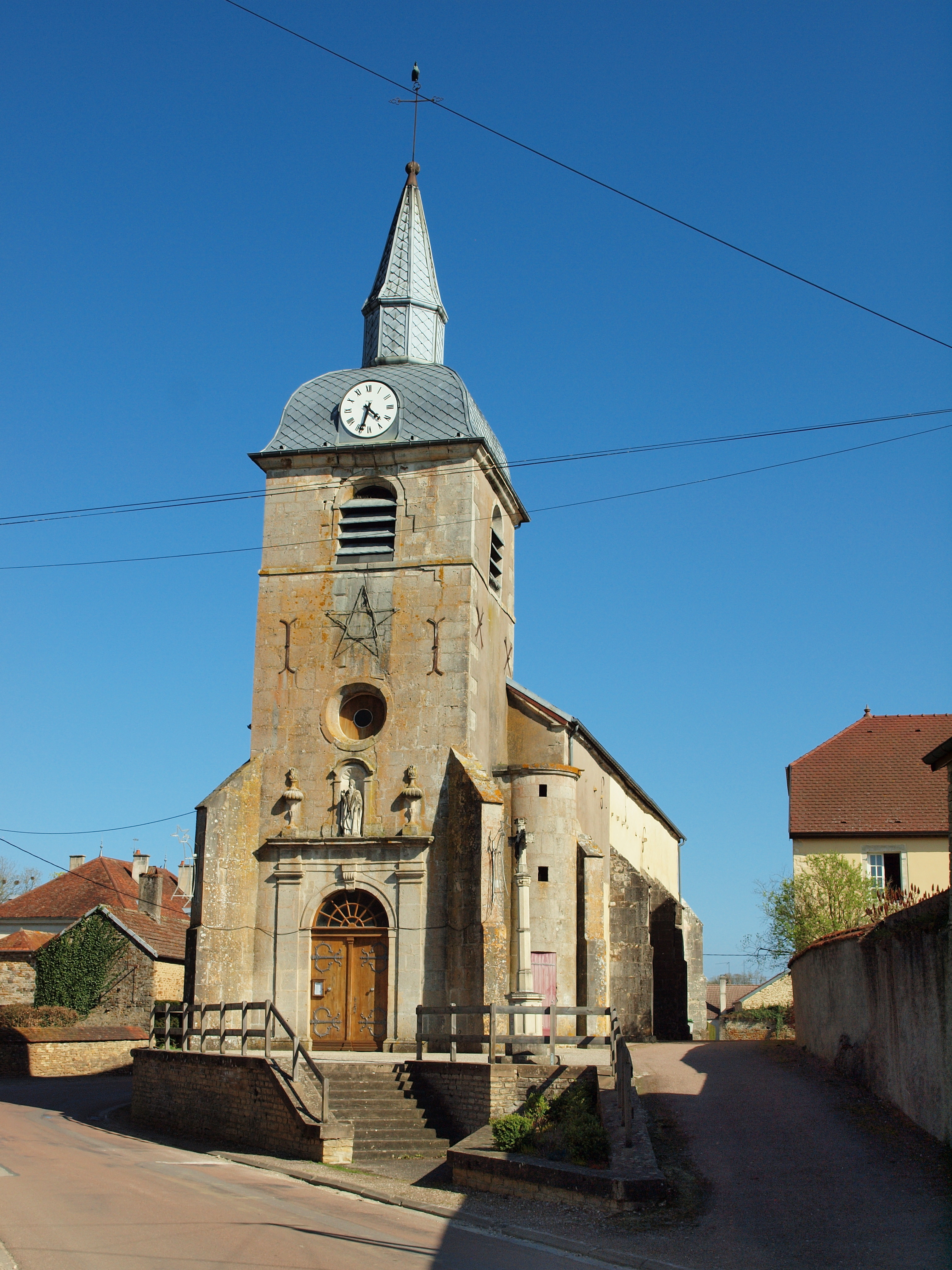 Villegusien-le-Lac (Haute-Marne, France)